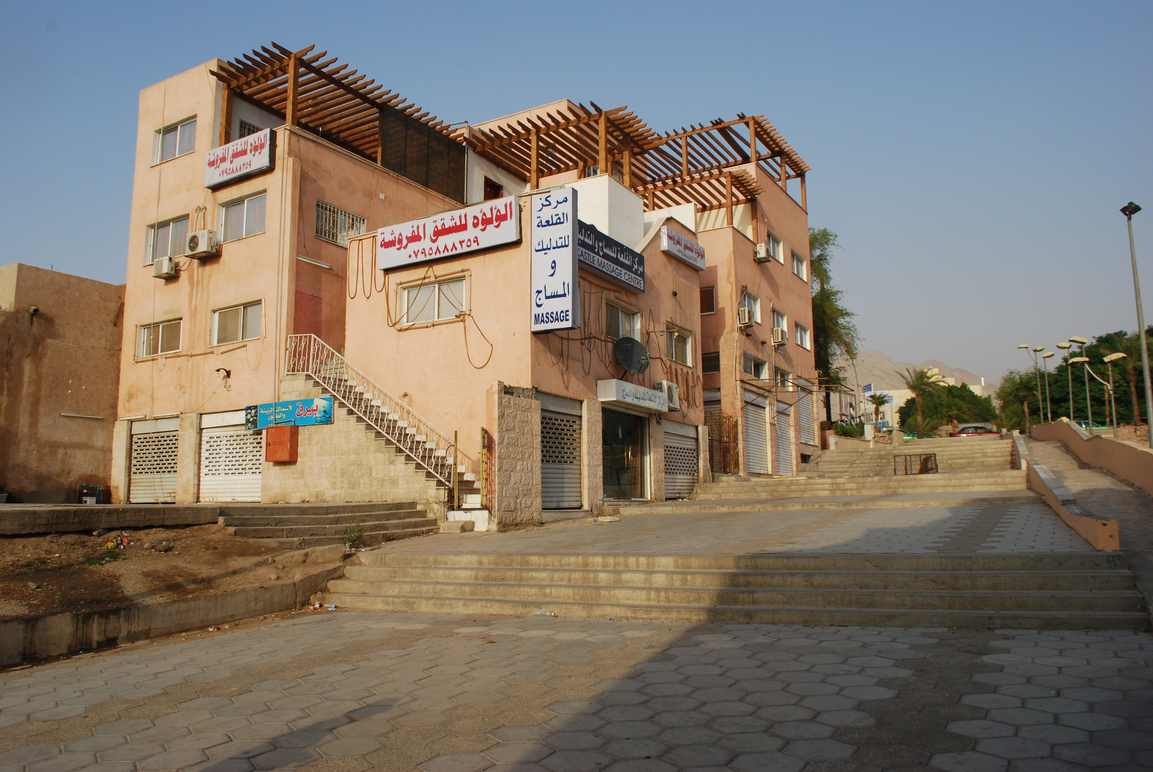 Aqaba : rue d'accès au fort, vers le boulevard côtier.